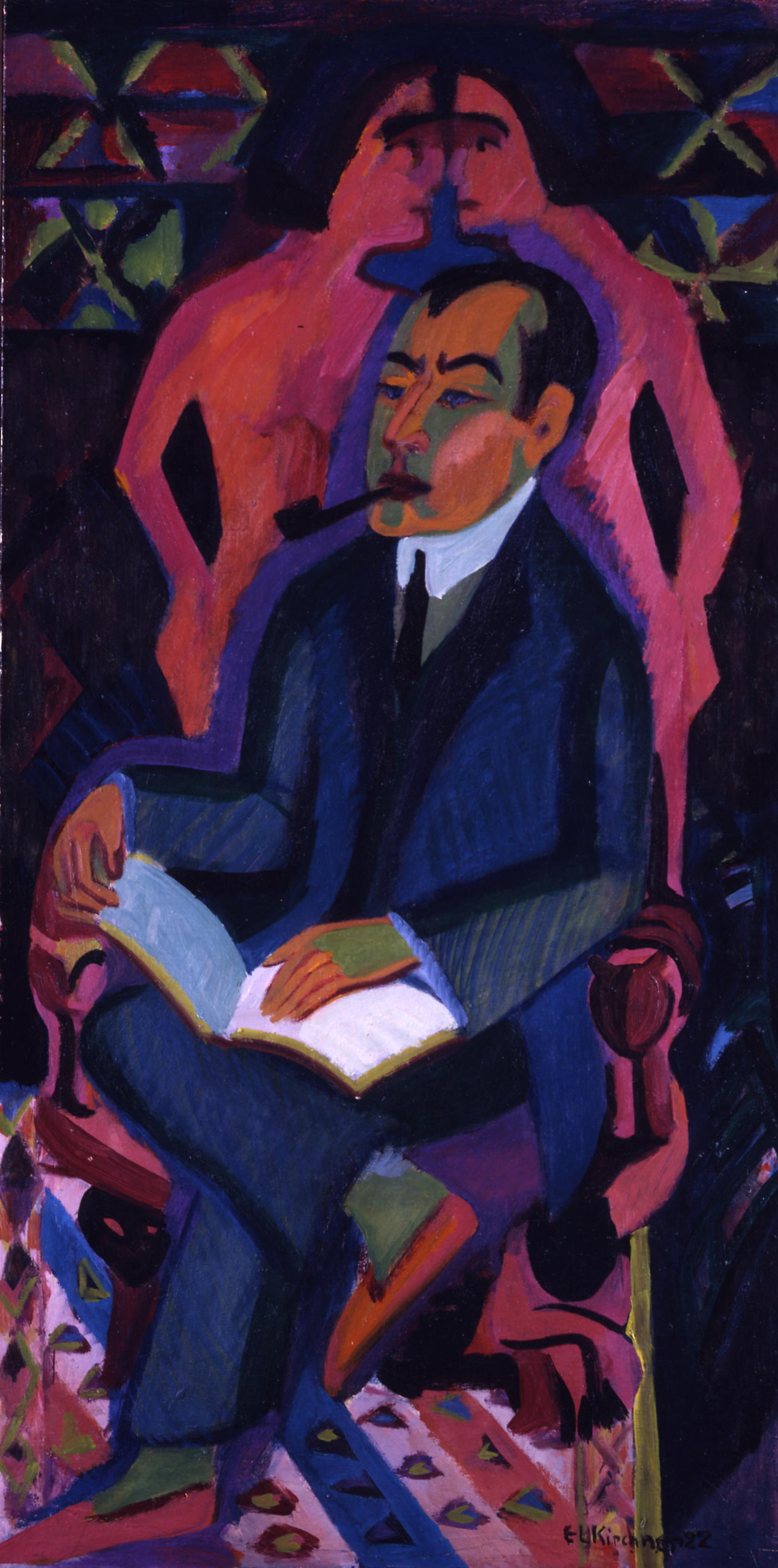 Portrait des Kunsthändlers Manfred Schames